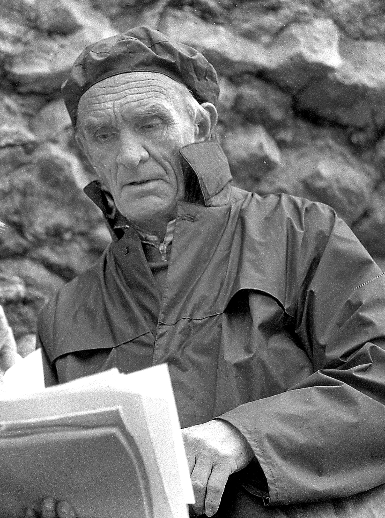 Peeter Varep